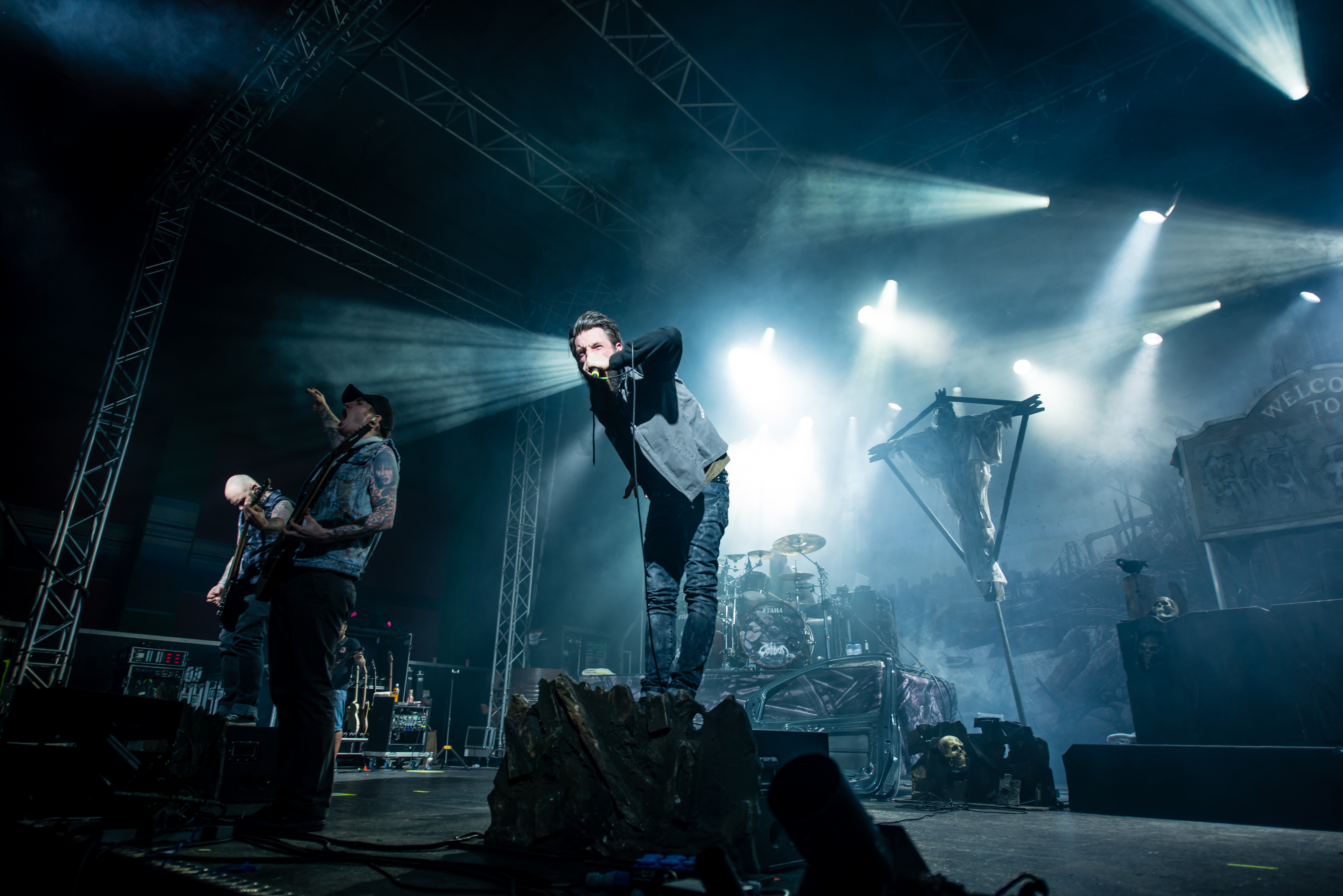 'Impericon Festival 2015; Oberhausen Turbinenhalle': 'Caliban'